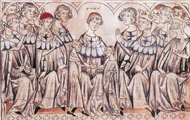 Wedding of John of Luxemburg and Elise of Premyslid in Speyer 1310 / Hochzeit Johanns von Luxemburg mit Elisabeth von Böhmen (Elisabeth (Eliška) Přemyslovna) in Speyer 1310